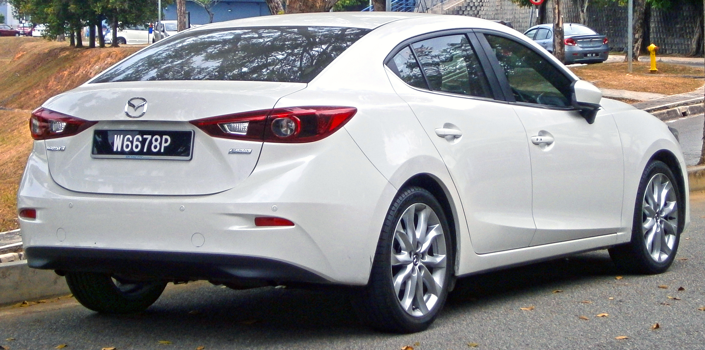 2014 Mazda 3 Sedan (BM) 2.0 SkyActiv (CBU) 4-door sedan